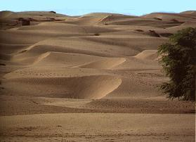 Dunas en el desierto de Sechura. Norte del Perú. Autor: Alfredobi Fecha: Marzo 2006